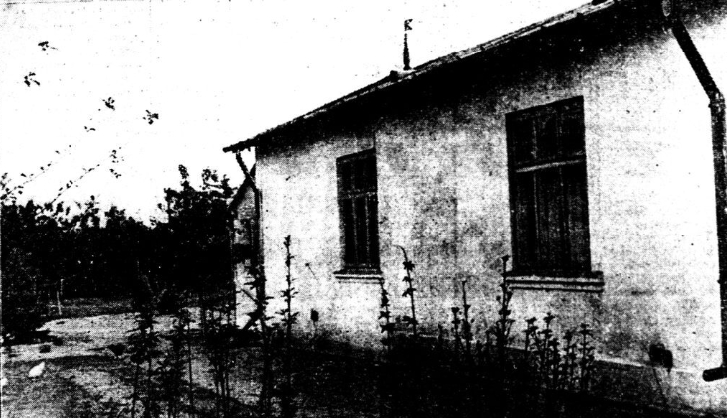 House od Adam Koc in Świdry Małe.